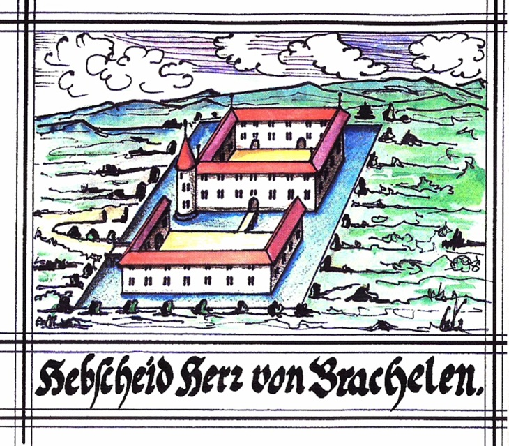 Gut Hebscheid im Codex Welser von 1723 - Kolorierte Nachzeichnung 2003